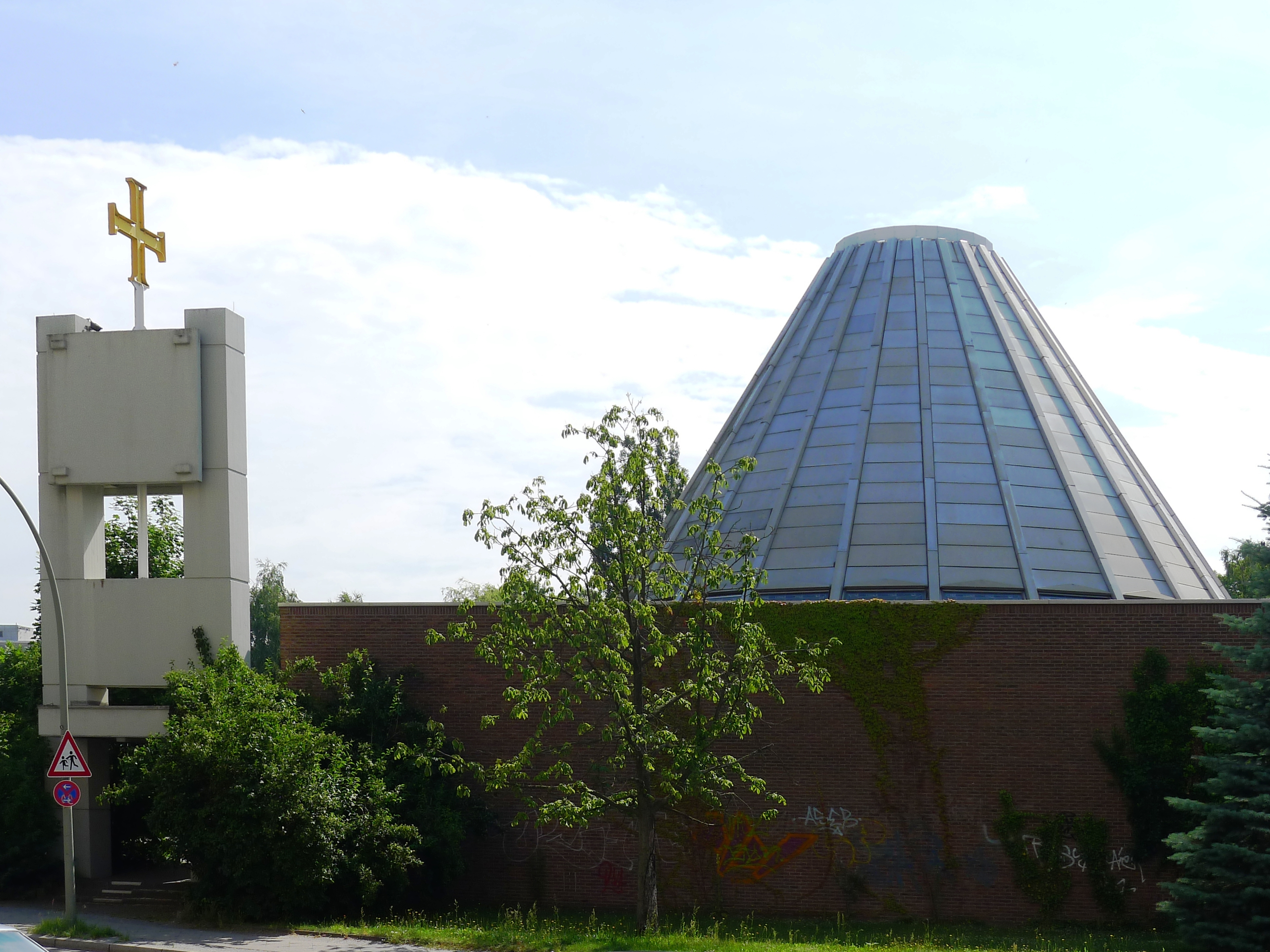 Blick auf die Kirche von der Straße aus